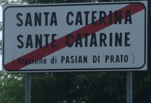 zweisprachige Ortstafel Italienisch-Friulisch: Santa Caterina / Sante Catarine